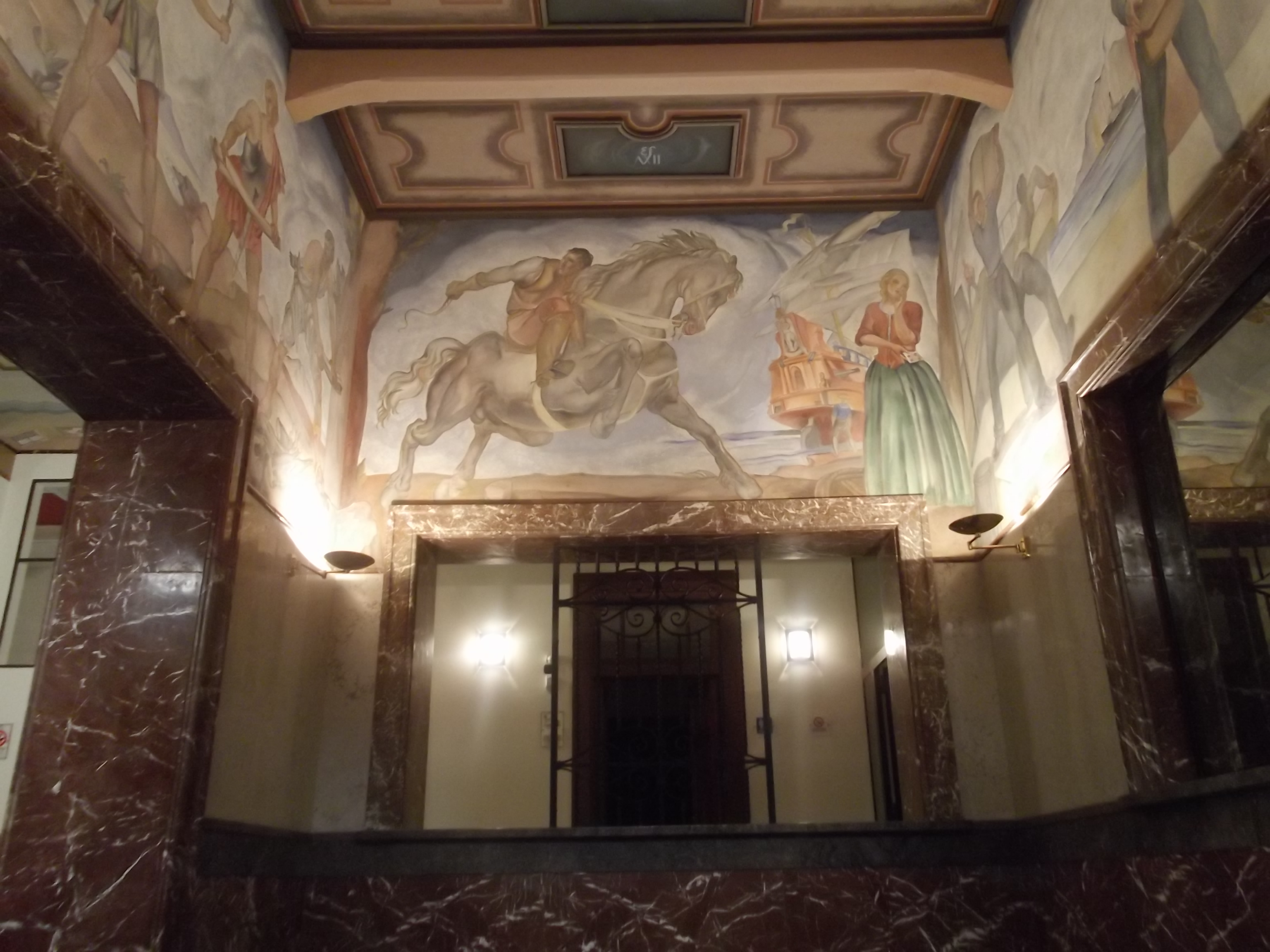 Gino Morici Palazzo delle Poste di CL: Allegoria dell'Italia 1937